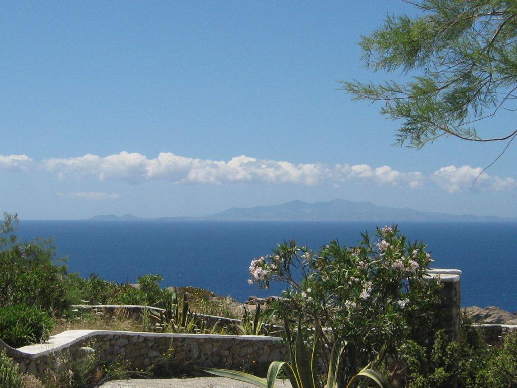 Nordseite der Insel Naxos, bei ungewöhnlich klarer Sicht von Mykonos aus fotografiert